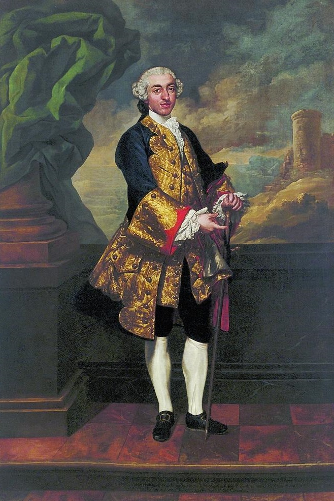 Retrato del aristócrata y militar español Francisco Javier Aguirre y Ortés de Velasco (1732-1763), IV marqués de Montehermoso. El retratado aparece vistiendo el uniforme grande de teniente de fragata de la Real Armada Española.